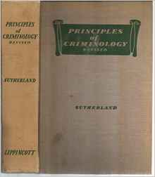 Српски (ћирилица): Принципи кримилогије